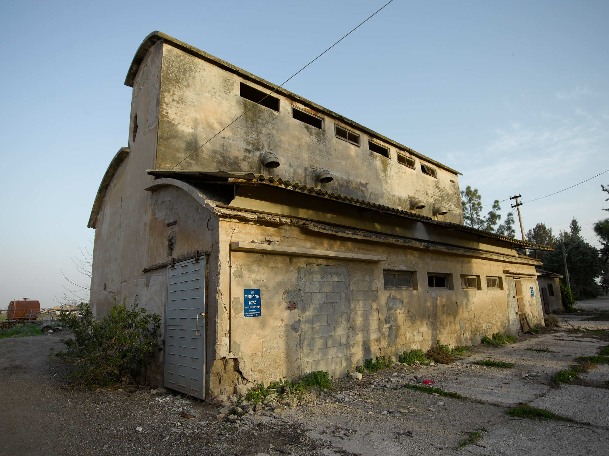 האסם בתל עדשים